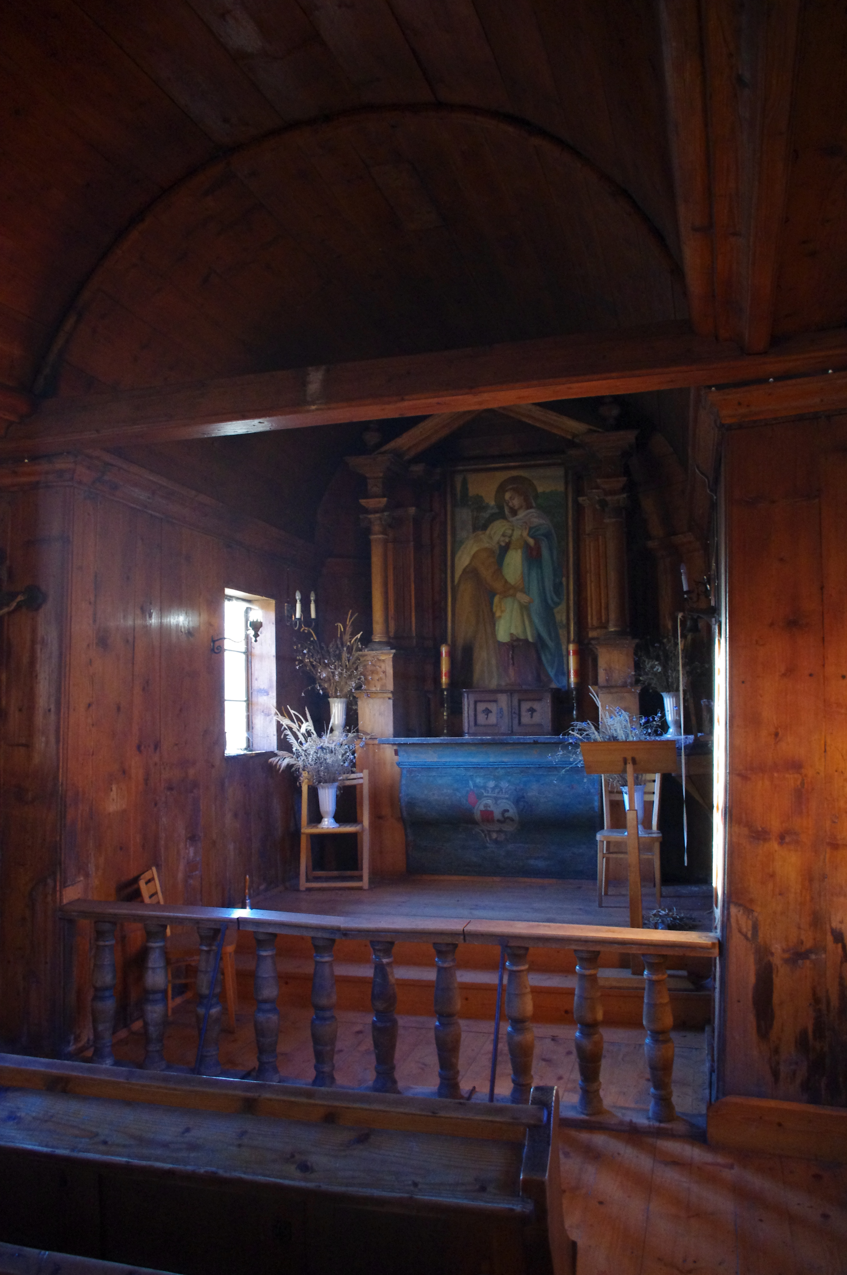 Ołtarz kaplicy dworskiej w Skomielnej Czarnej